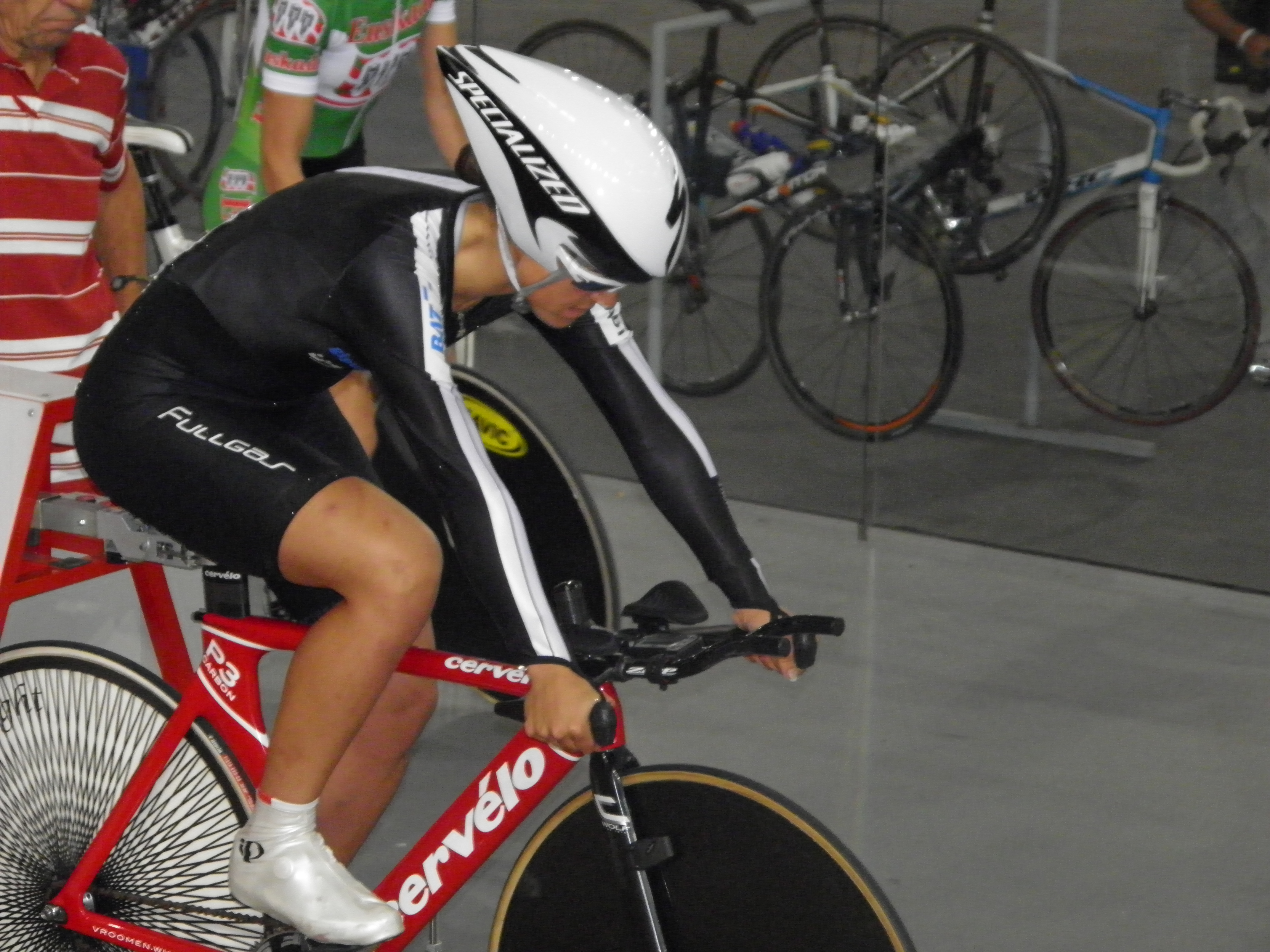 Leire Olaberria Pistako Espainiako txapelketetan Mallorcan 2010 ean